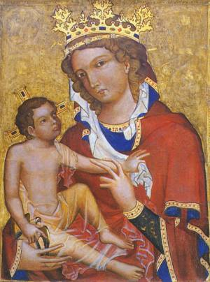 Madona Veverská - obraz ze 14. století. Fotografie jeho kopie umístěné v Místní knihovně ve Veverské Bítýšce.